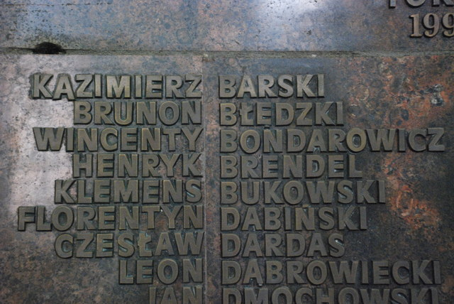 Brunon Błędzki, tablica pamiątkowa pomordowanych w Katyniu umieszczona w nawie kościoła Św. Ducha w Toruniu